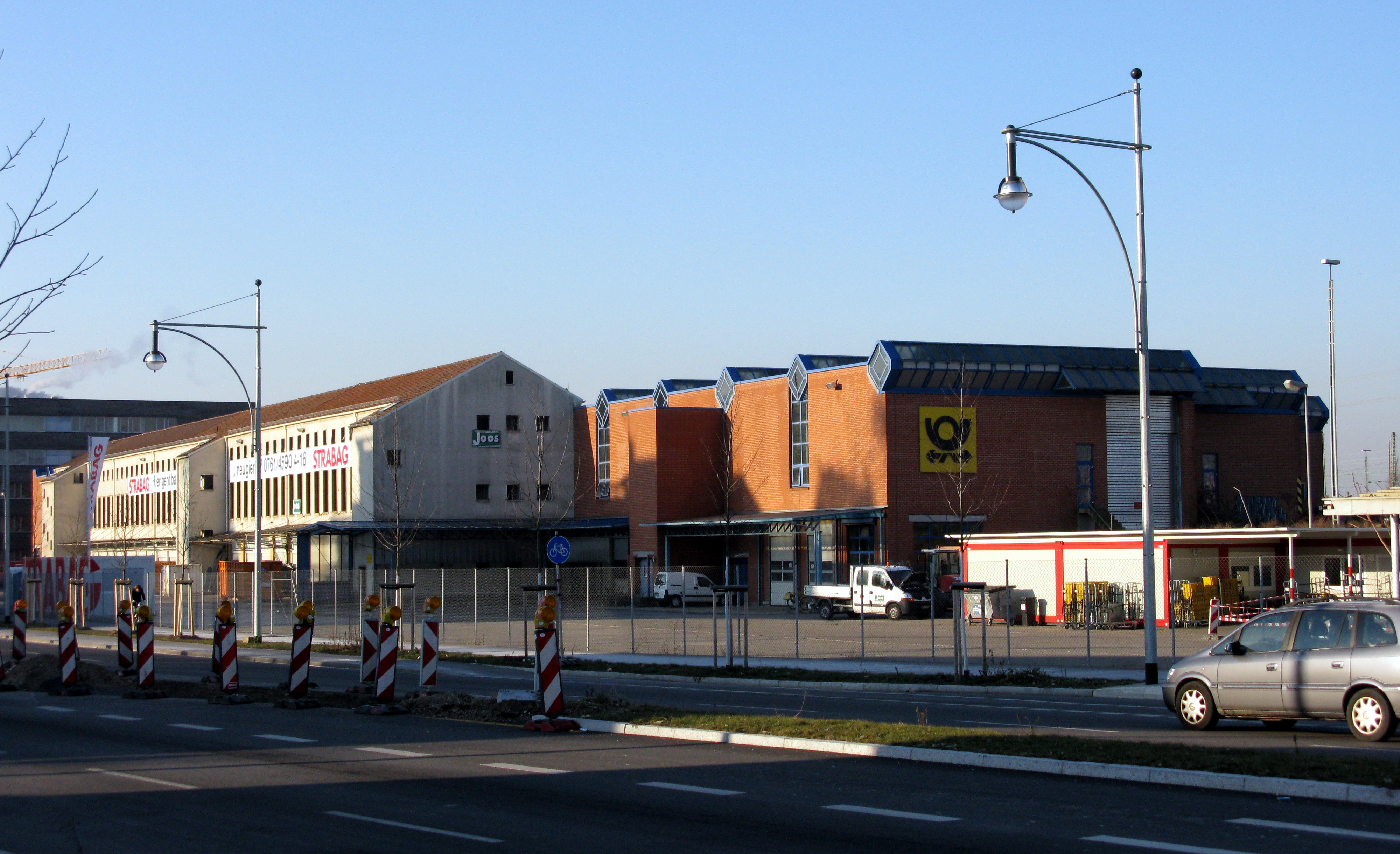 Freiburg, Postbahnhof, Ansicht von der Heinrich-von-Stephan-Straße, kurz vor dem Abriss